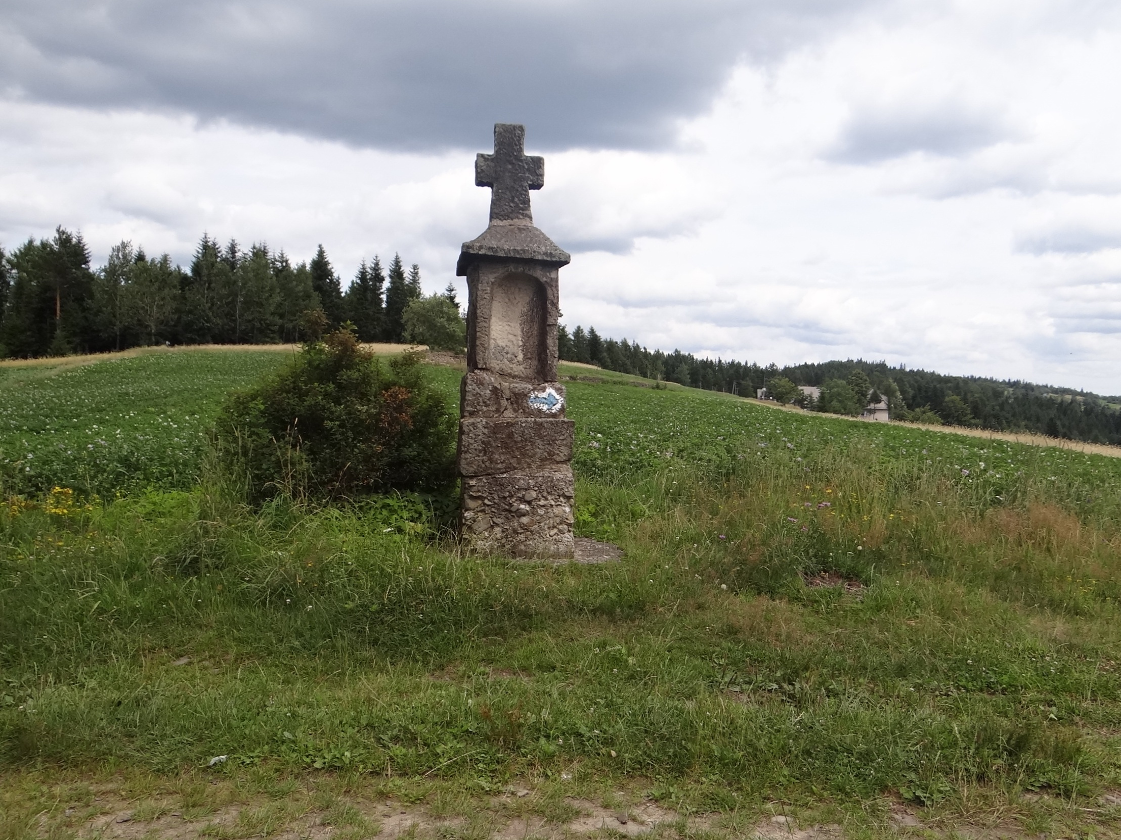 Krzyż w Bogdanówce na przełęczy między Koskową Górą i Praszywką